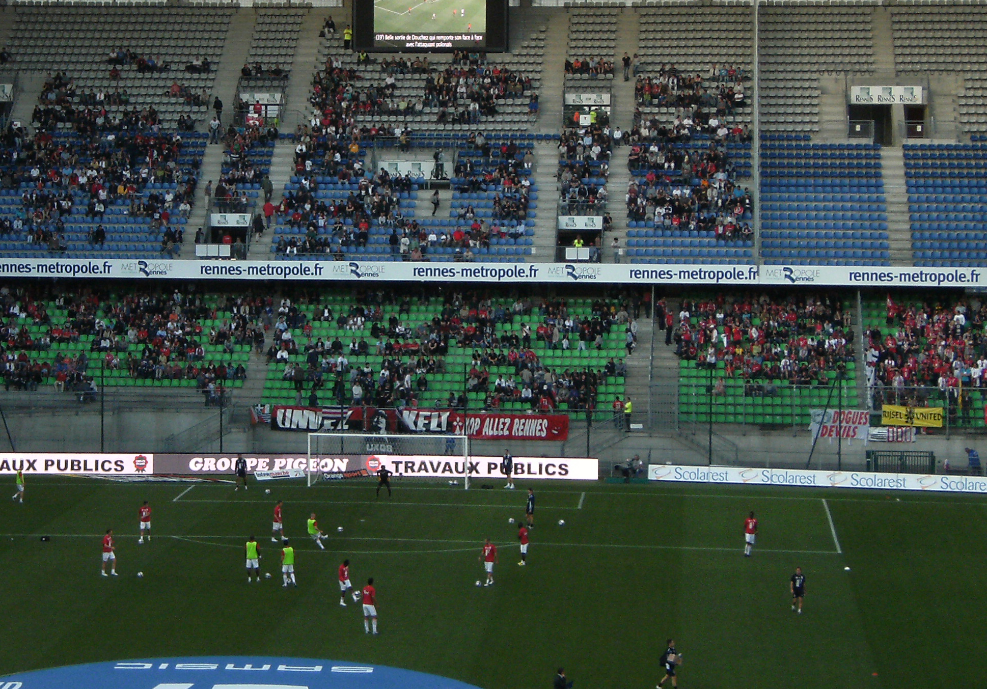 Groupes de supporters rennais Unvez Kelt et Allez Rennes, au stade de la route de Lorient, avant un match disputé face à Lille